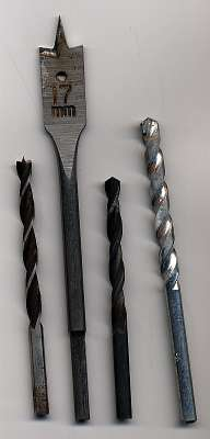 boortjes; eigen foto categorie:afbeelding gereedschap